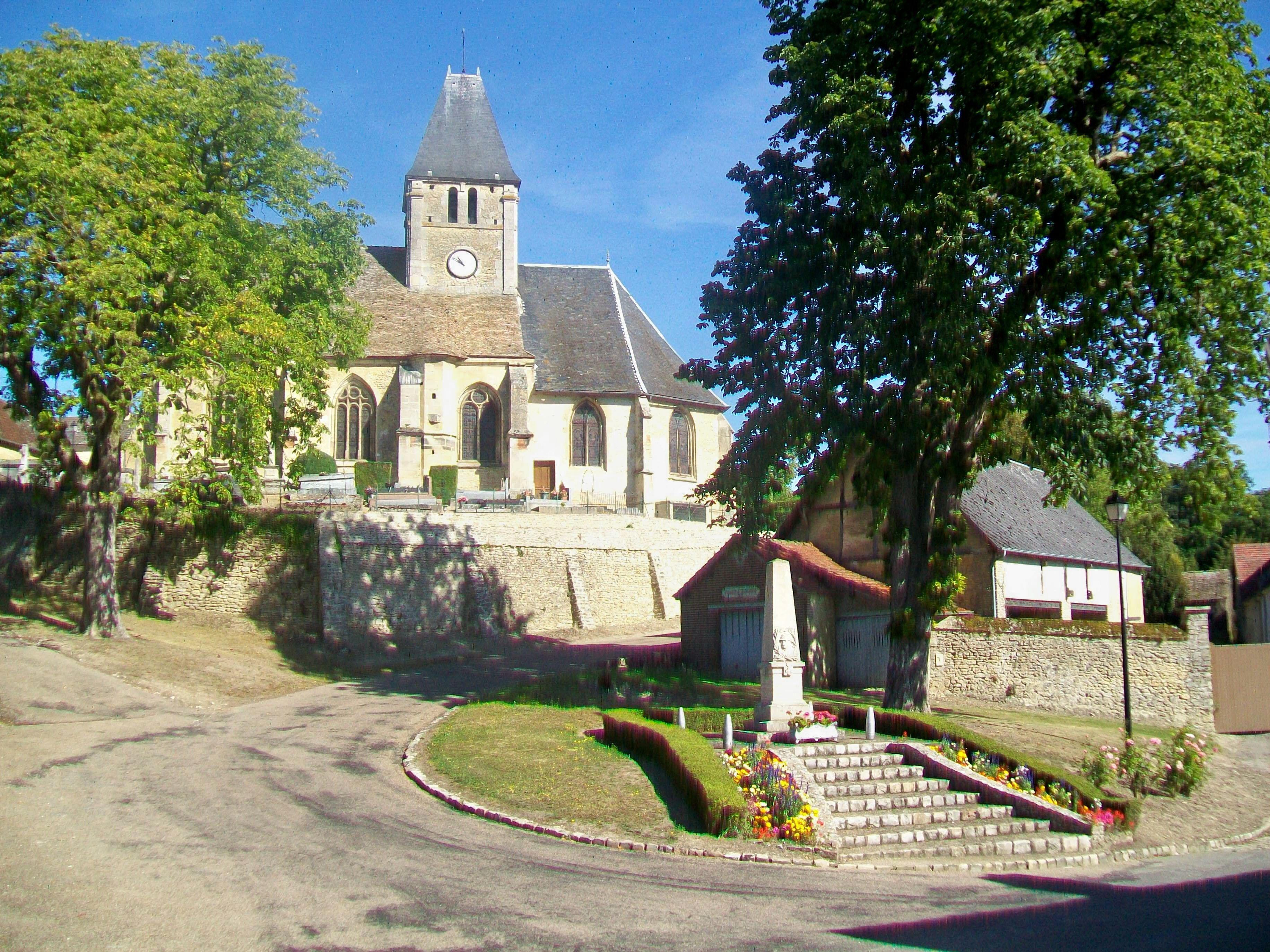 La place du village et l'église Saint-Ouen.